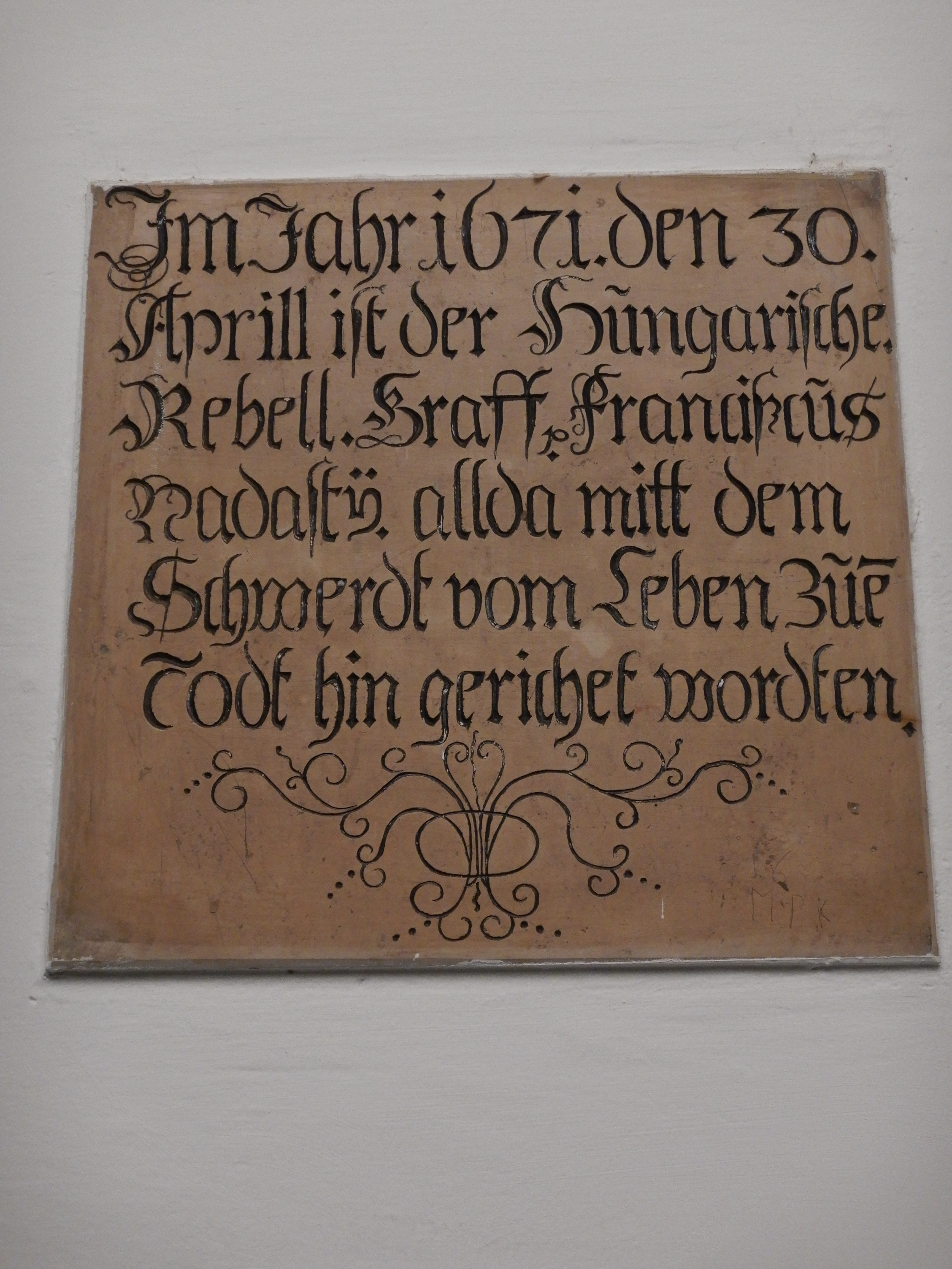 Gedenktafel für Franz III. Nádasdy (Wien, Wipplingerstraße 8, Dokumentationsarchiv des Österreichischen Widerstands)